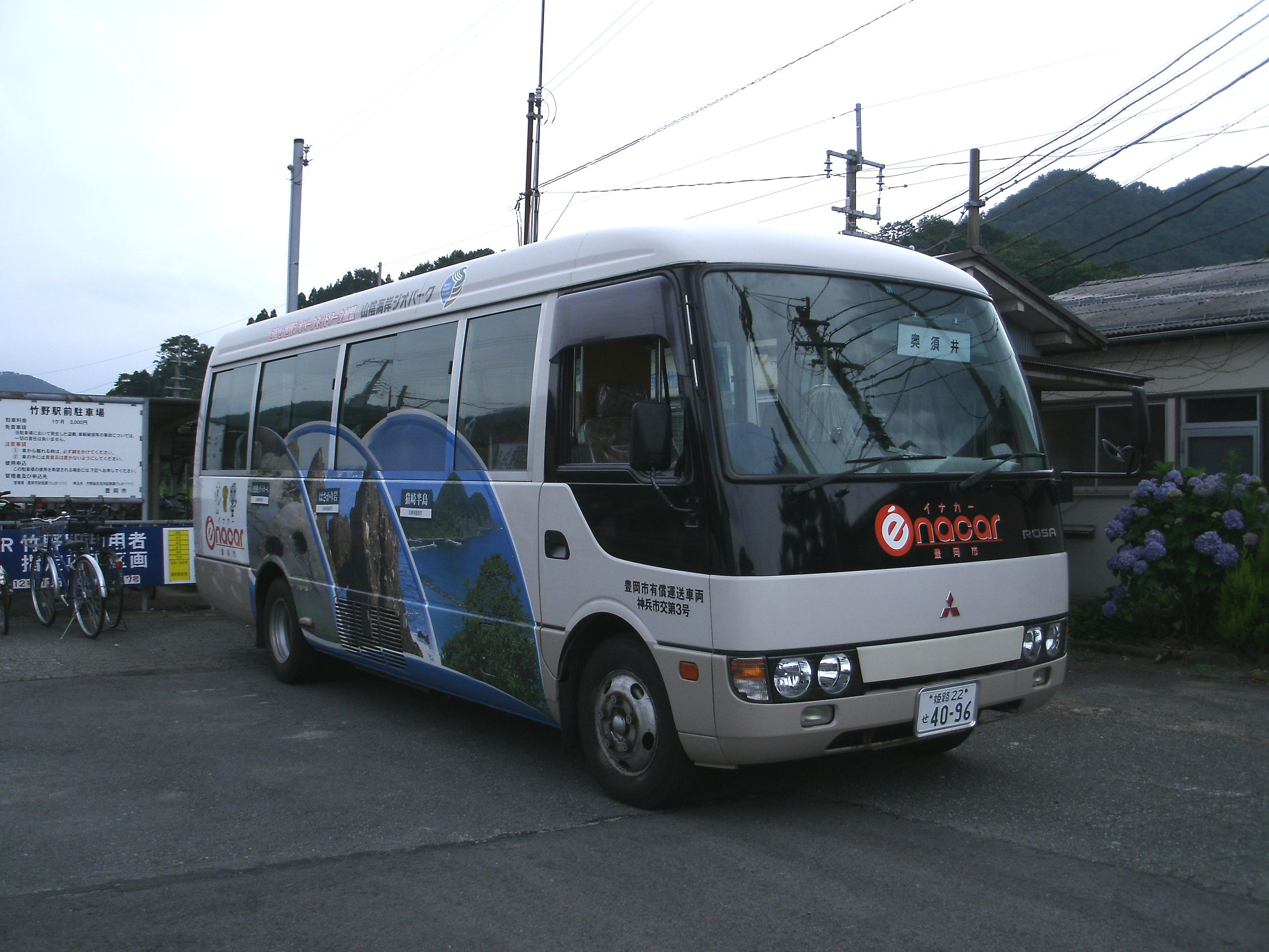 イナカー竹野海岸線 JR竹野駅前にて